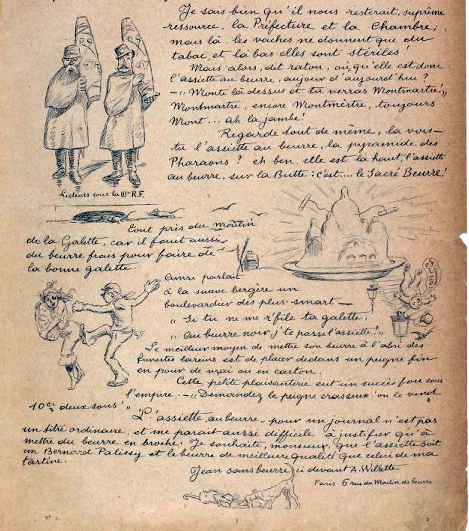 Prétendue lettre au directeur dans le premier numéro de L'Assiette au beurre (extrait). Texte: Je sais bien qu'il nous resterait, suprême ressource, la Préfecture et la Chambre [des députés] ; mais là, les vaches ne donnent que du tabacet là-bas elles sont stériles ! Mais alors, dit Raton, où qu'elle est donc l'assiette au beurre, au jour d'aujourd'hui ? - "Monte là-dessus et tu verras Montmartre !" Montmarte, encore Montmèrtre [sic], toujours Mont... ah la jambe ! Regarde tout de même, la vois-tu l'assiette au beurre, la pyramide des Pharaons ? eh ben, elle est là haut, l'assiette au beurre, sur la Butte : c'est ... le Sacré Beurre ! Tout près du moulin de la Galette, car il faut aussi du beurre frais pour faire de la bonne galette. Ainsi parlait à la suave bergère un boulevardier des plus smart. "Si tu ne me r'file pas ta galette, au beurre noir j'te passe l'assiette !" Le meilleur moyen de mettre son beurre à l'abri des funestes larcins est de placer dedans un peigne fin en pour de vrai ou en carton. Cette petite plaisanterie eut un succès fou sous l'empire. - "Demandez le peigne crasseux, on le vend 10c. deux sous". L'assiette au beurre pour un journal n'est pas un titre ordinaire et me paraît aussi difficile à justifier qu'à mettre du beurre en broche. Je souhaite, Monsieur, que l'assiette soit un Bernard Palissy et le beurre de meilleure qualité que celui de ma tartine. Jean sans beurre, ci-devant A. Willette Paris, 6 rue du Moulin de beurre